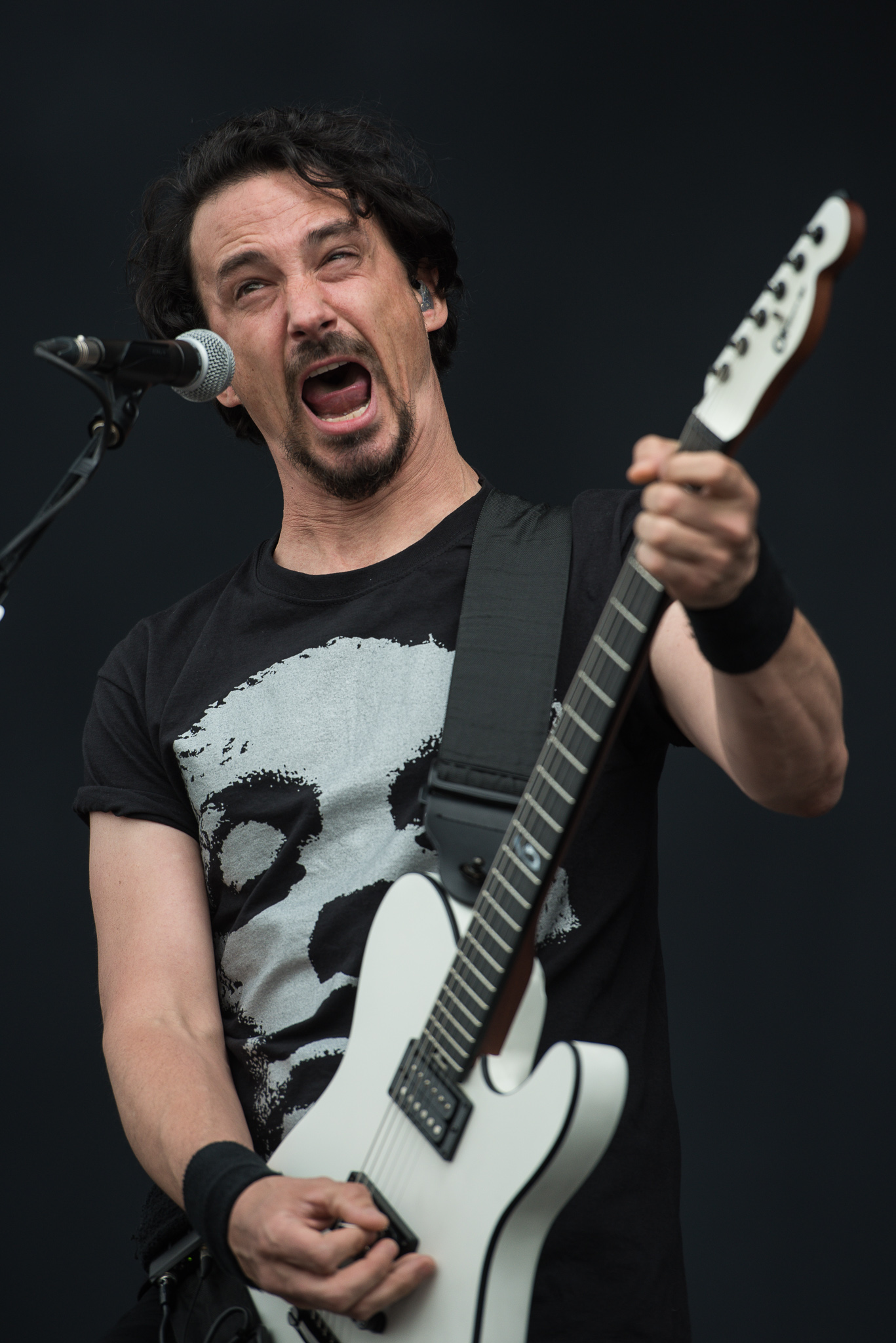 ARGO-Konzerte,Gojira,Joe Duplantier,Konzert,Livekonzert,Livemusik,Musik,RiP,Rock im Park 2017,Zeppelin Stage